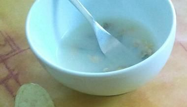 Escopinyes preparades amb suc de llimona i un toc de pebre negre per l'aperitiu. També s'hi veu una patata xip que ha caigut del plat veí.